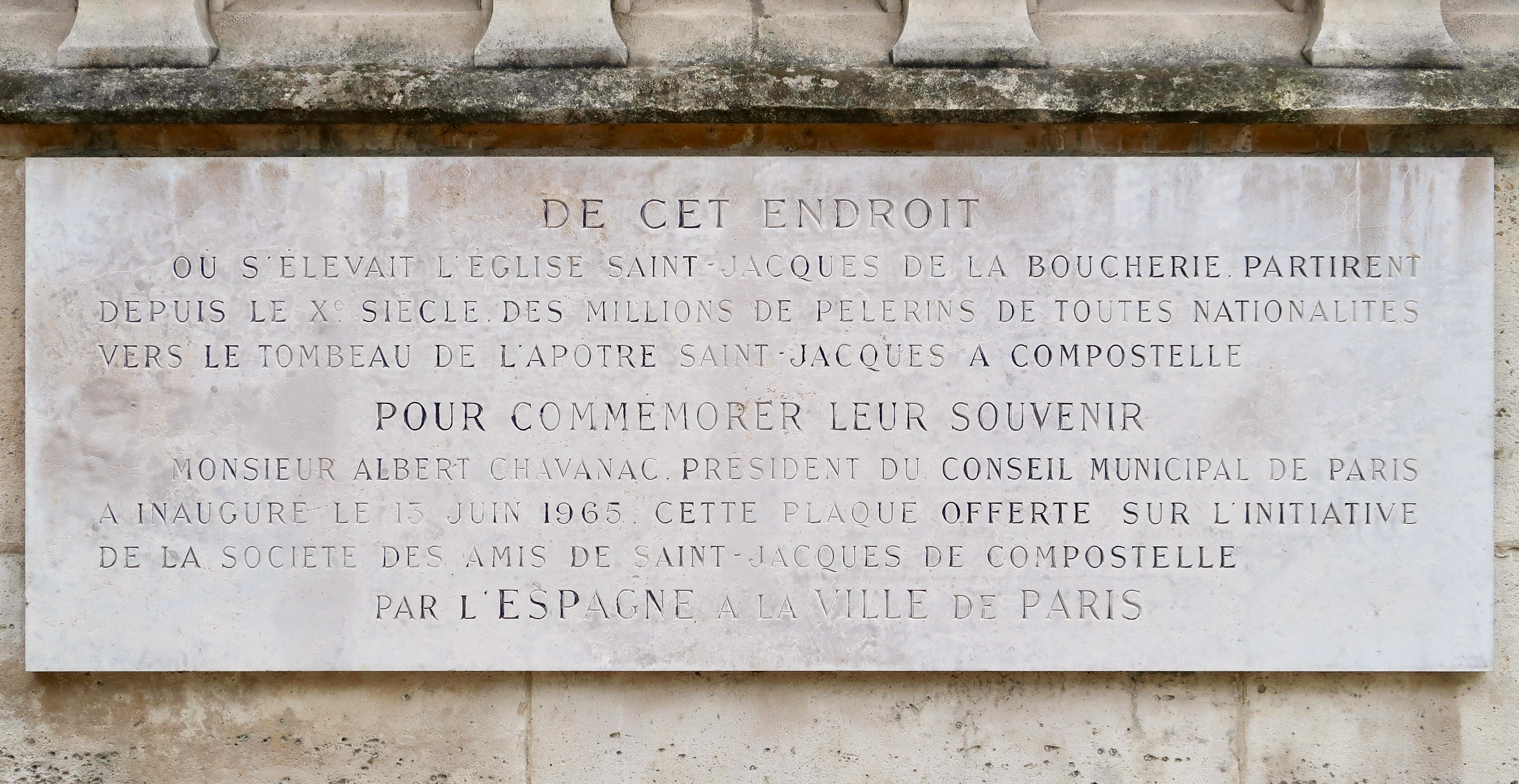 Plaque dans le square remplaçant l'ancienne église Saint-Jacques-de-la-Boucherie, au sujet du pèlerinage de Saint-Jacques-de-Compostelle (Paris, 4e).